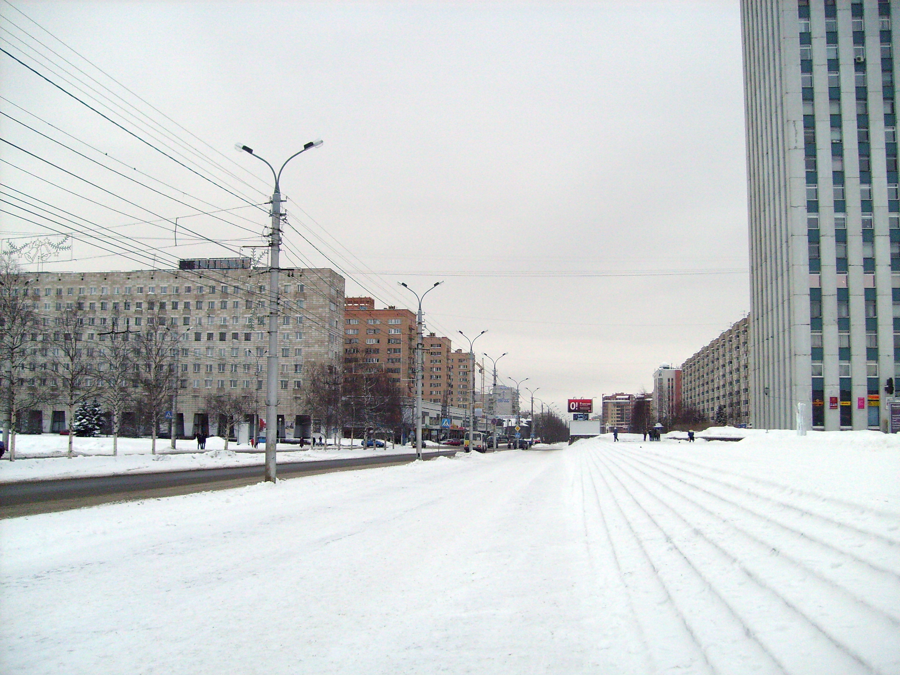 Архангельск, начало улицы Воскресенской.